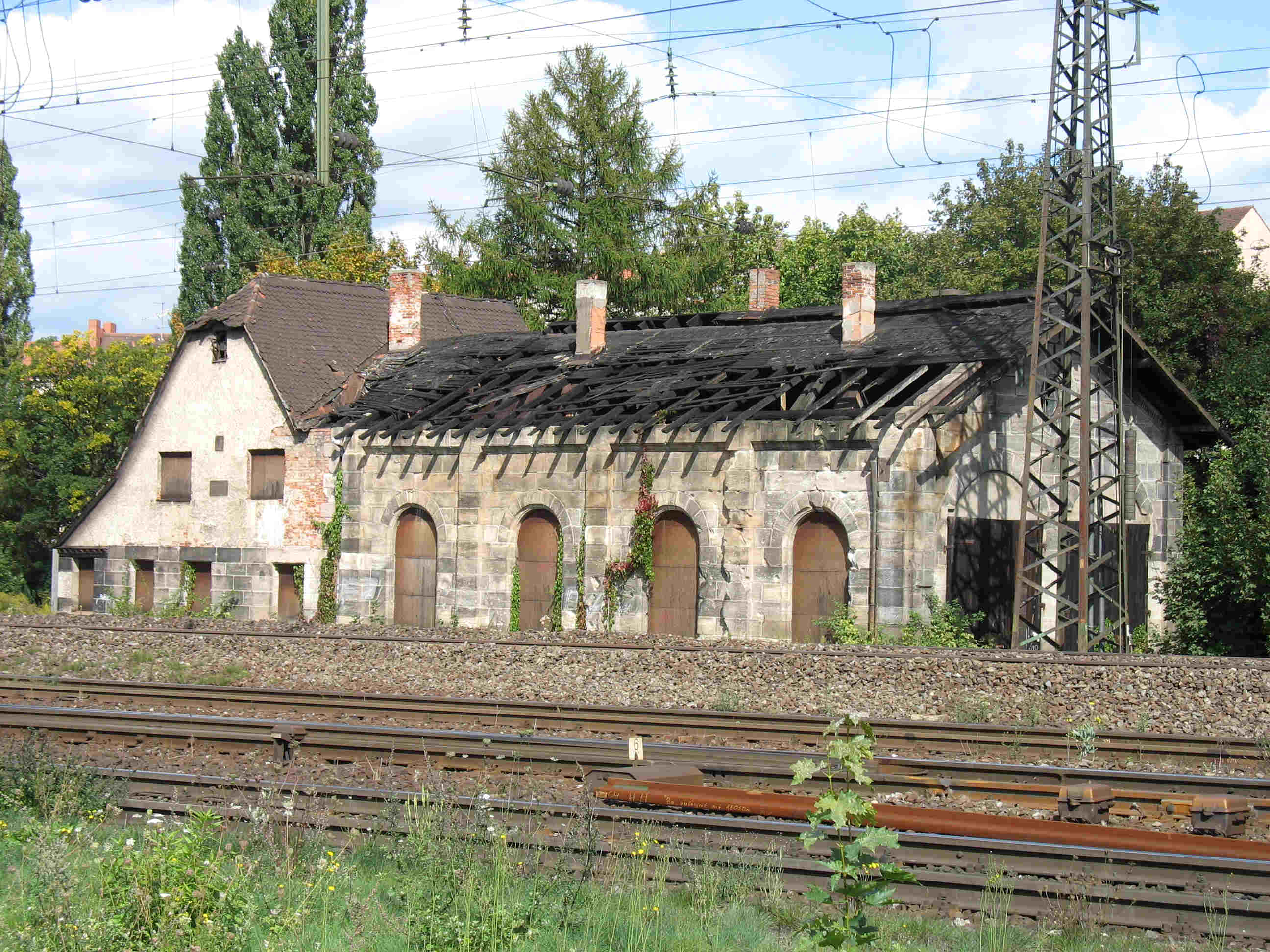 Lokschuppen an der Stadtgrenze Nürnberg/Fürth (Fürth, Karolinenstraße 90, nahe U-Bahnstation Stadtgrenze) evtl. schon 1844 oder um 1865 (rechter Teil), Anbau links um 1911. Da die Bahn und die Verwaltungsgesellschaft Aurelis seit Jahrzehnten jegliche Unterhaltsmaßnahmen unterlässt und selbst Anordnungen auf Notsicherung des Daches gerichtlich abweisen lässt, ist das Gebäude in einem äußerst schlechten Zustand.